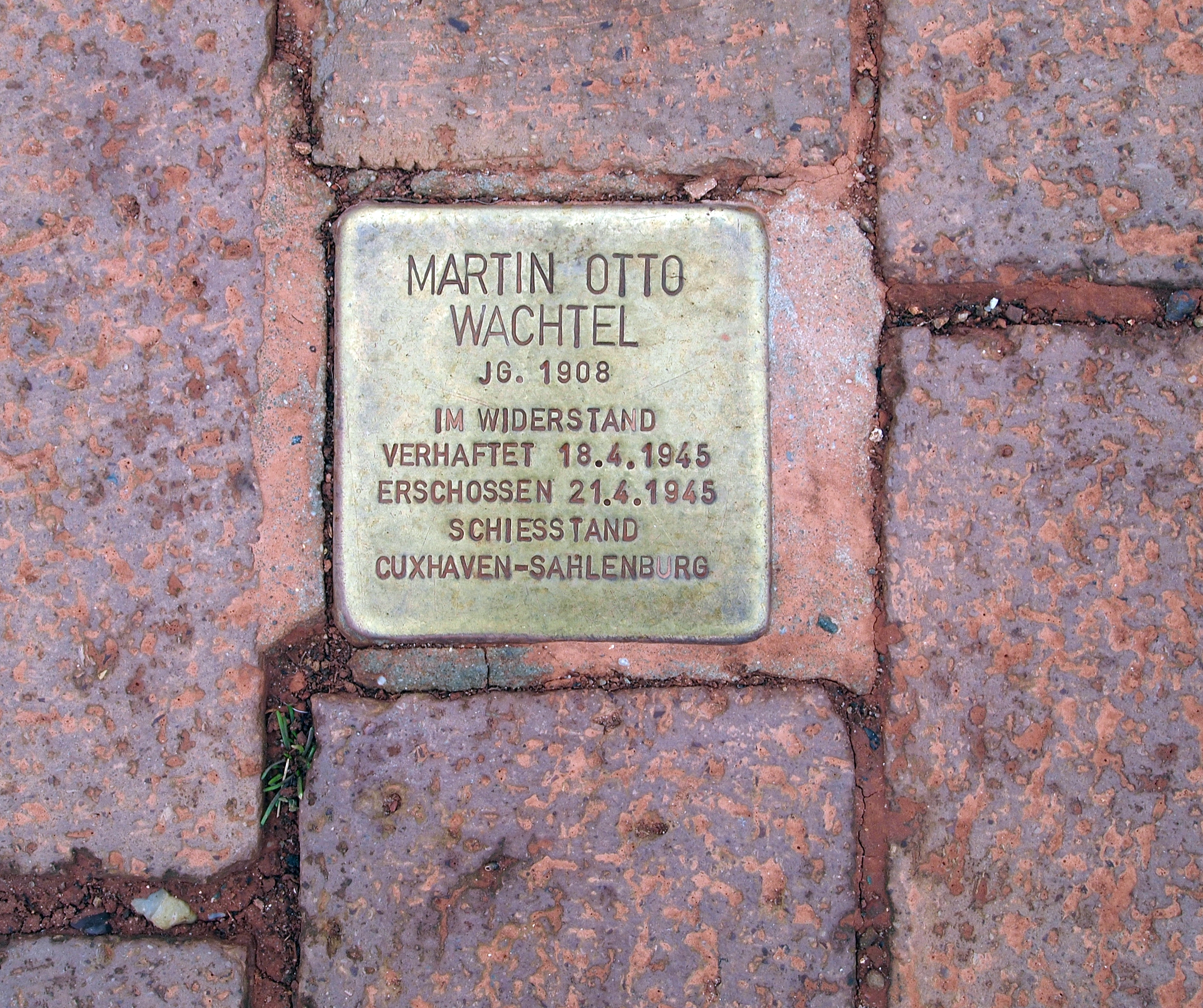 Stolperstein auf Helgoland für Martin Otto Wachtel, am Klippenrandweg beim Berlliner Bären, Oberland